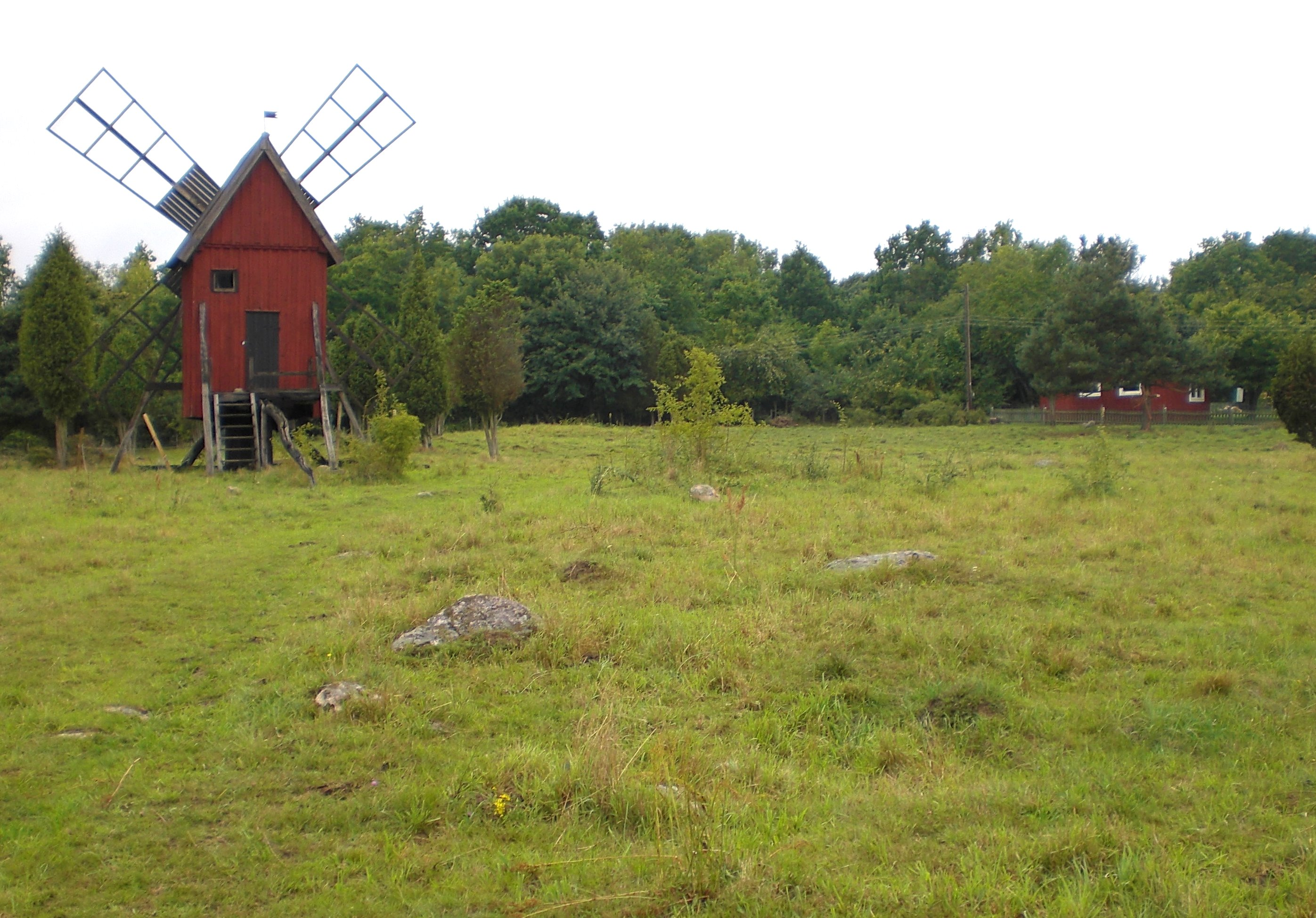 Blick auf das Gebiet des Gräberfelds von Ramsättra auf Öland